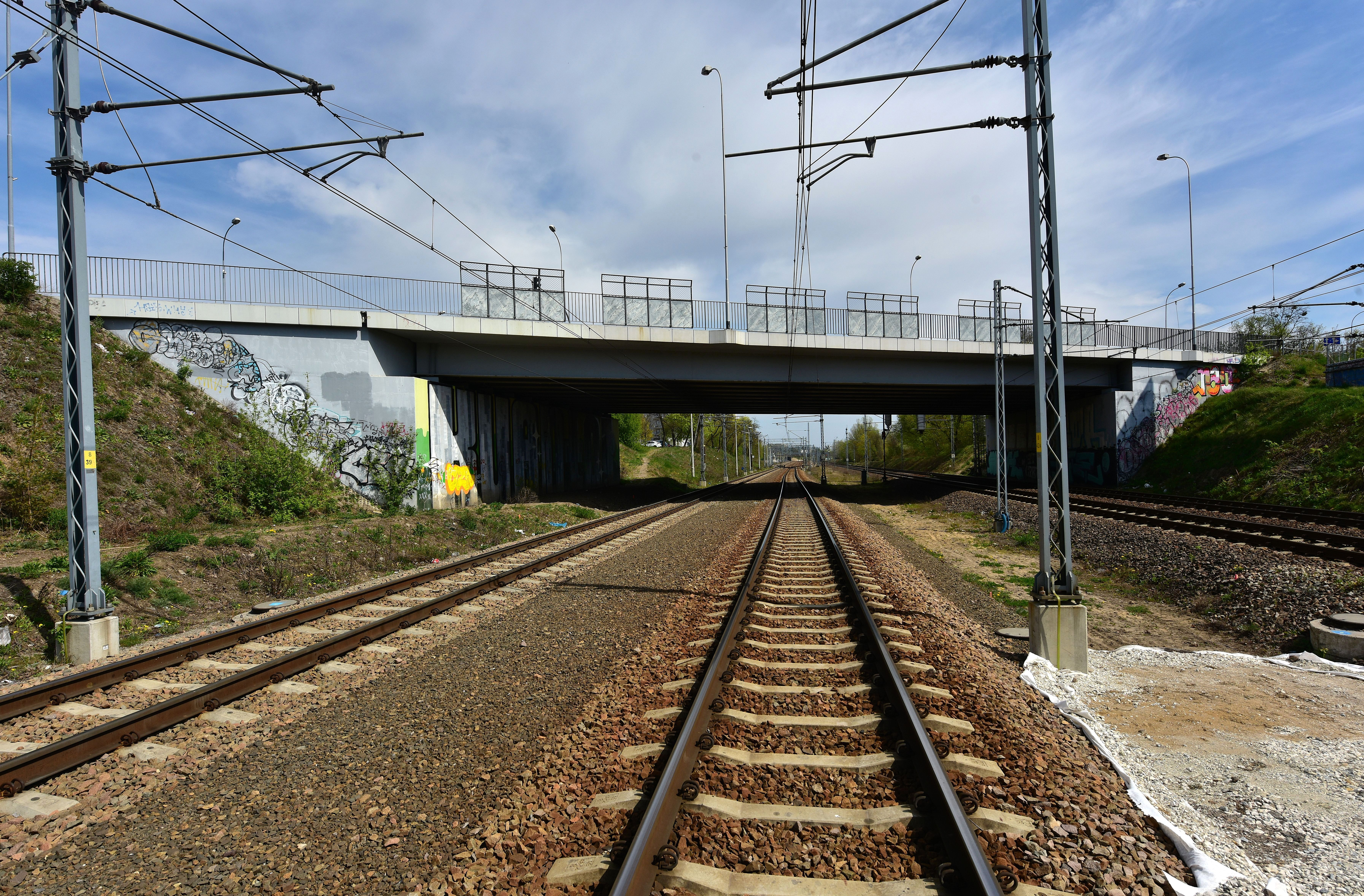 Wiadukt kolejowy w ciągu ul. Powązkowskiej w Warszawie